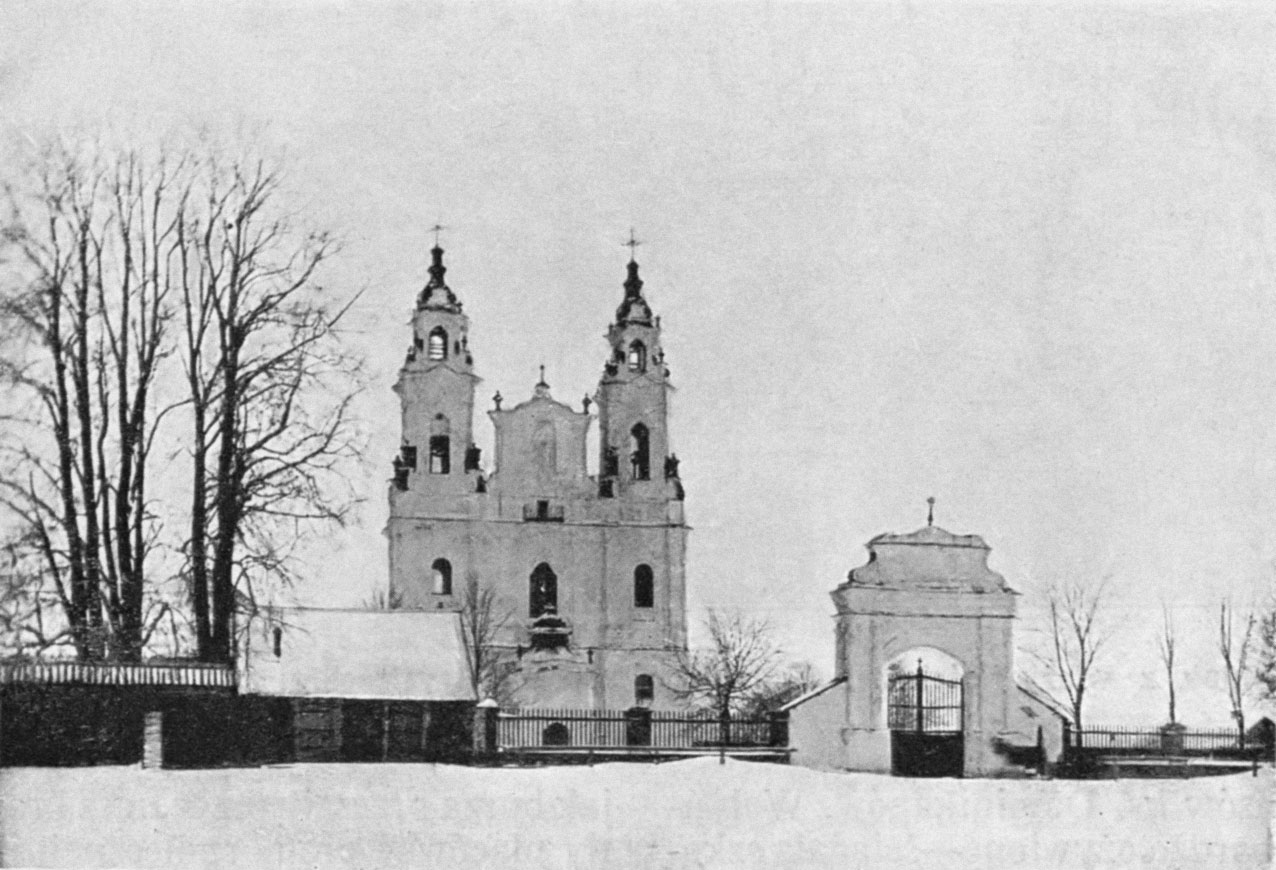 Беларуская (тарашкевіца): Валынцы (Vałyncy), Забелы (Zabieły). Касьцёл Сьвятога Юрыя і кляштар дамініканаў